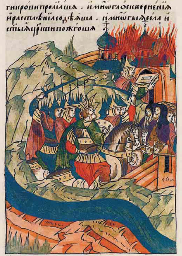 Лицевой летописный свод. 1521 год. Нашествие крымского хана Мехмед Гирея.